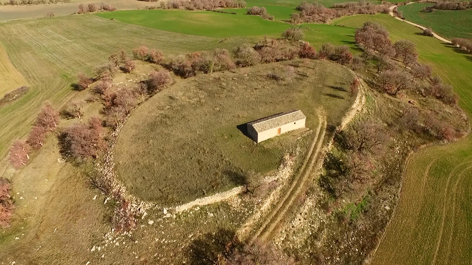 Castro en el que esta situada la ermita